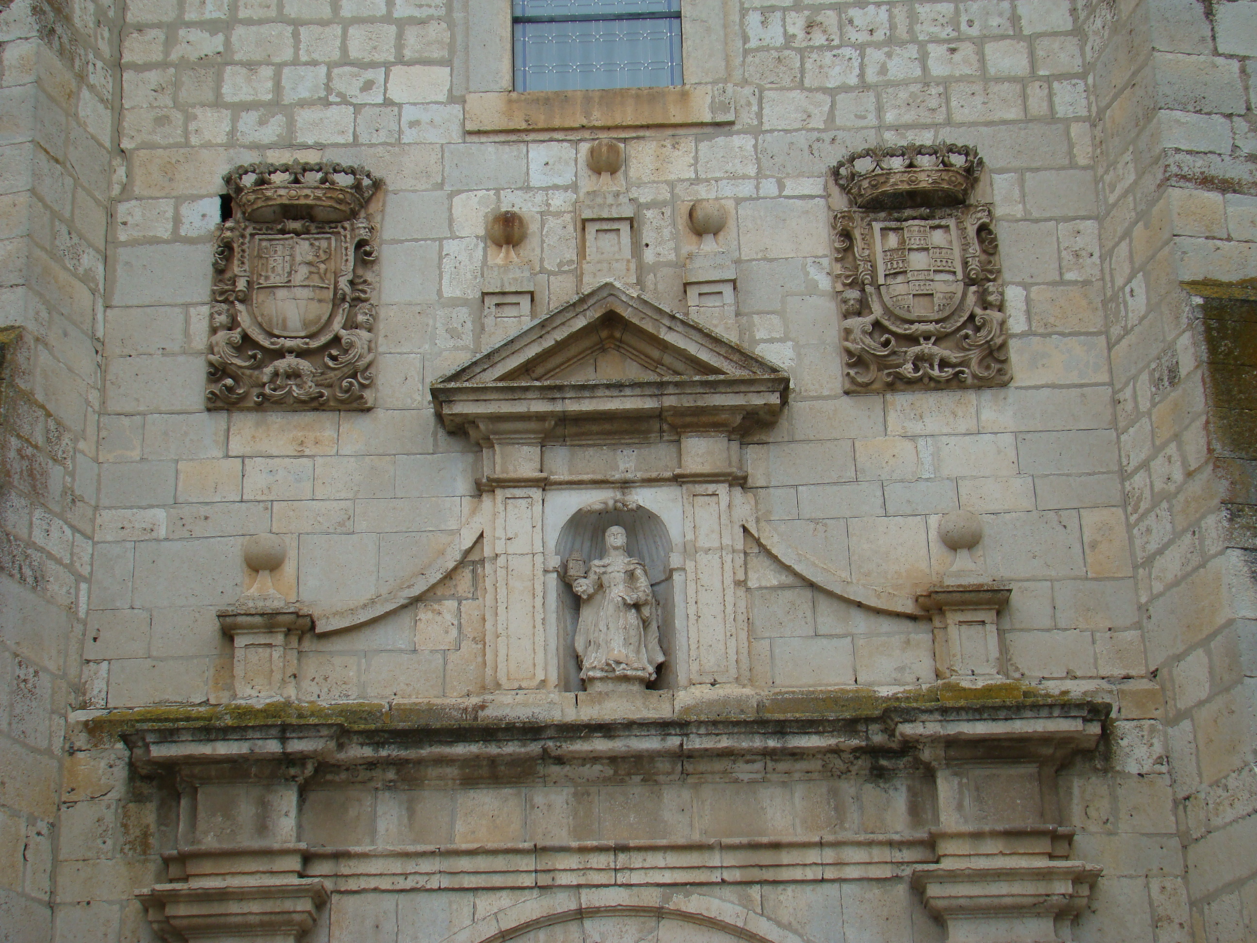 Detalle de la fachada principal de la iglesia del convento de Santa Clara, también llamado Convento de Las Claras; fue un antiguo monasterio de monjas Clarisas Franciscanas construido en el siglo XVII dentro del estilo barroco y emplazado en la localidad de Peñafiel (Valladolid, Castilla y León, España). En el lienzo de pared se ven los escudos de los patronos del Convento, la familia Téllez Girón.